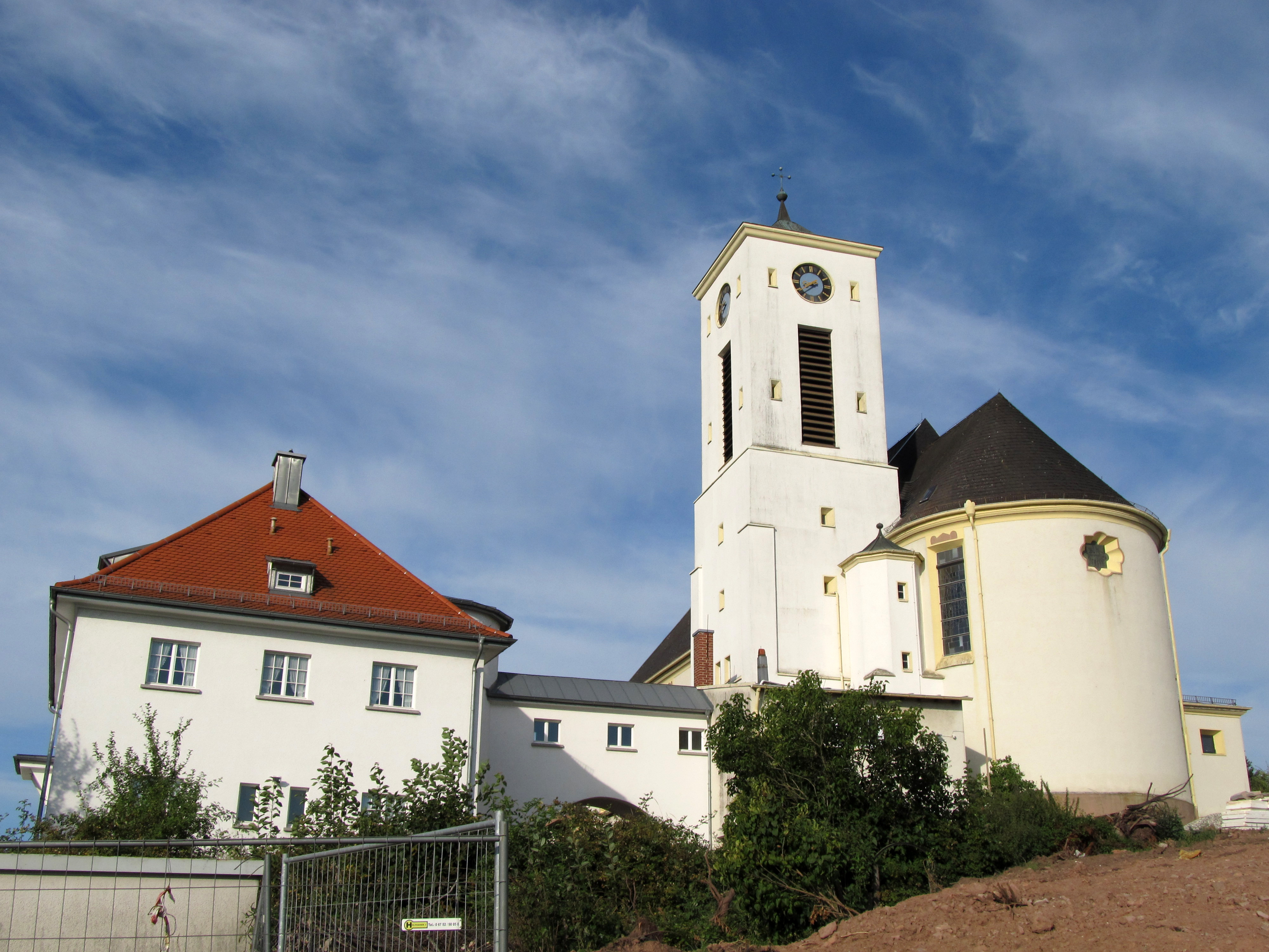 Die katholische Pfarrkirche St. Josef in Frankenholz, einem Stadtteil von Bexbach, Saarland